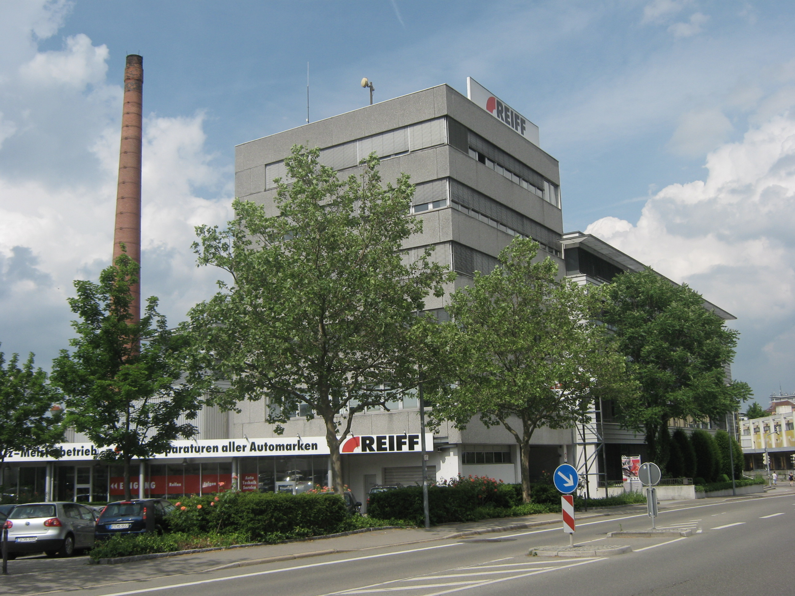 Sitz der Reiff Gruppe in Reutlingen